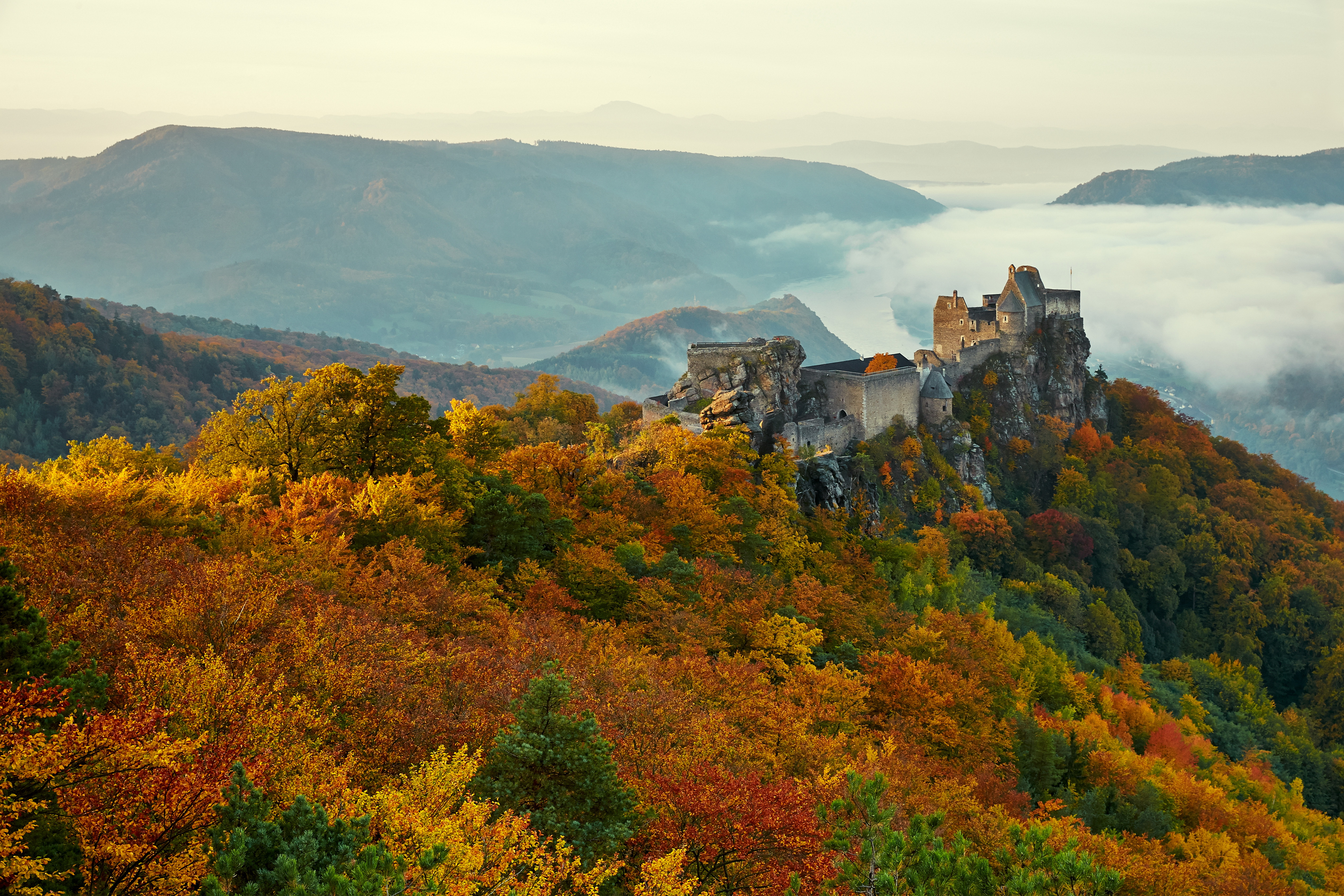 Blick auf die Ruine Aggstein